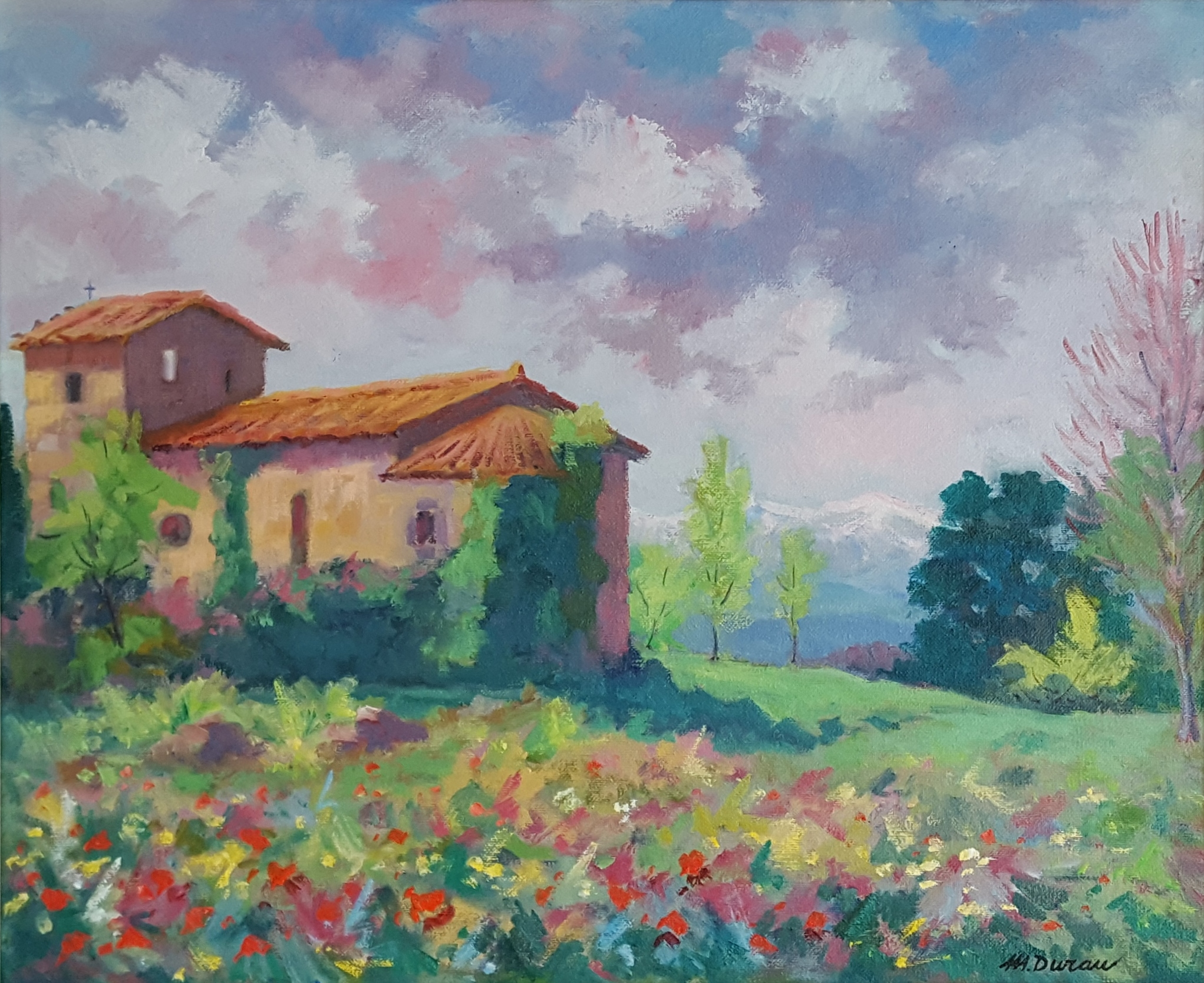 Ölbild: La Trinitat de Batet (Romanische Kirche, Olot, Katalonien, Spanien) Maler: Miquel Duran, Les Preses, 1989, im Hintergrund die schneebedeckten Pyrenäen, Privatsammlung Süddeutschland